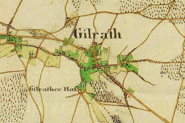 Preußische Kartenaufnahme 1846 - Uraufnahme - (5002 Geilenkirchen)